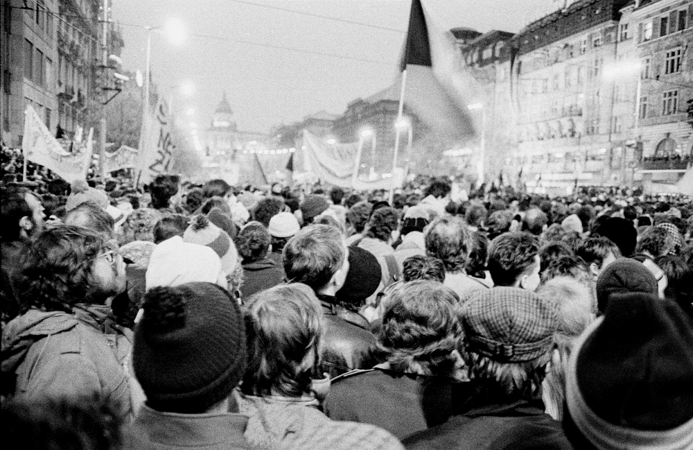 Praha, Václavské náměstí, před Melantrichem.